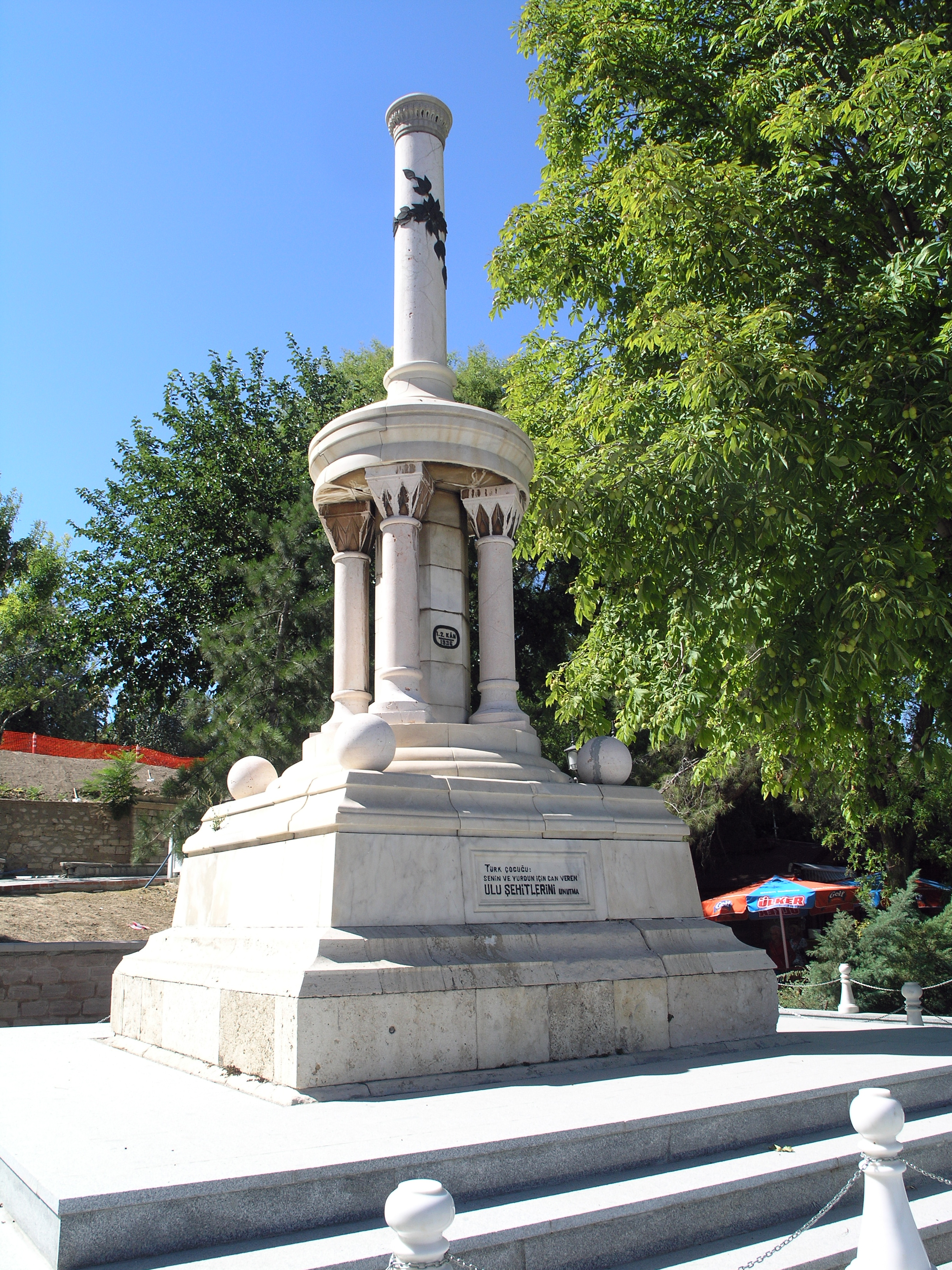 Konya Şehit Anıtı, Alaaddin Tepesi (2012)